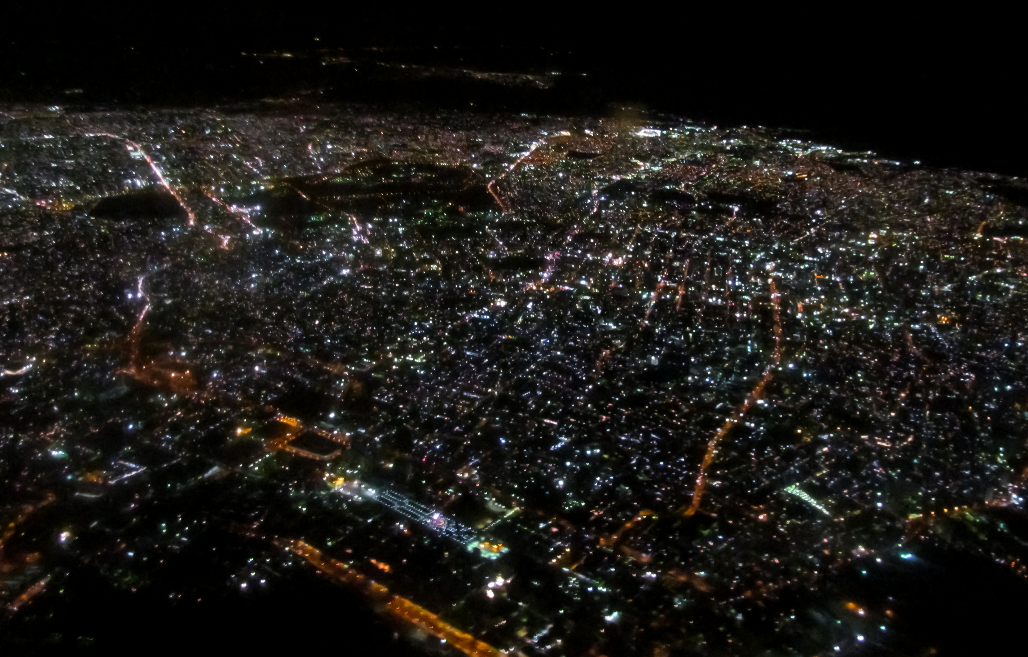 Vista aerea de Maracaibo